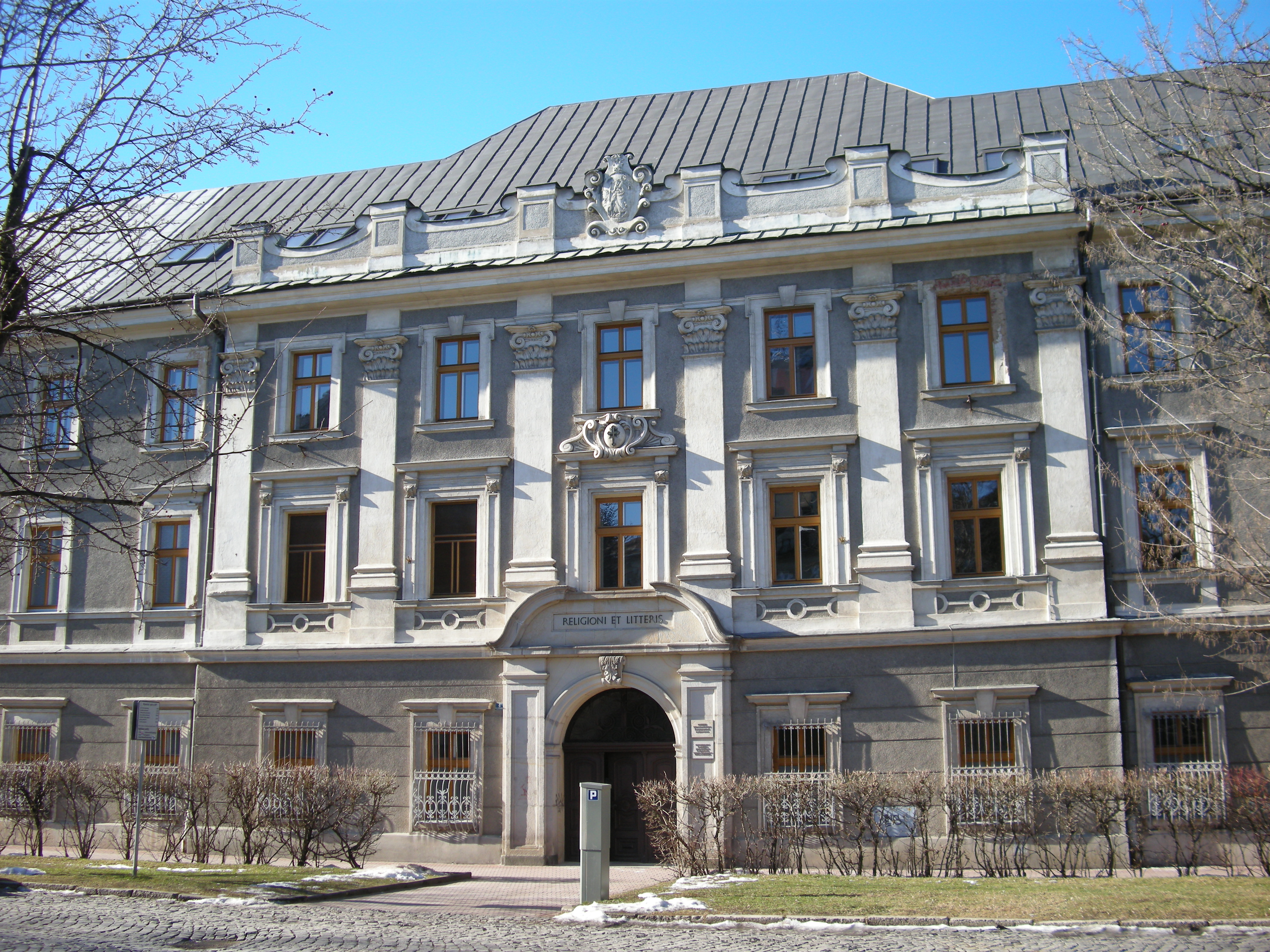 Budynek Wyższego Seminarium Duchownego